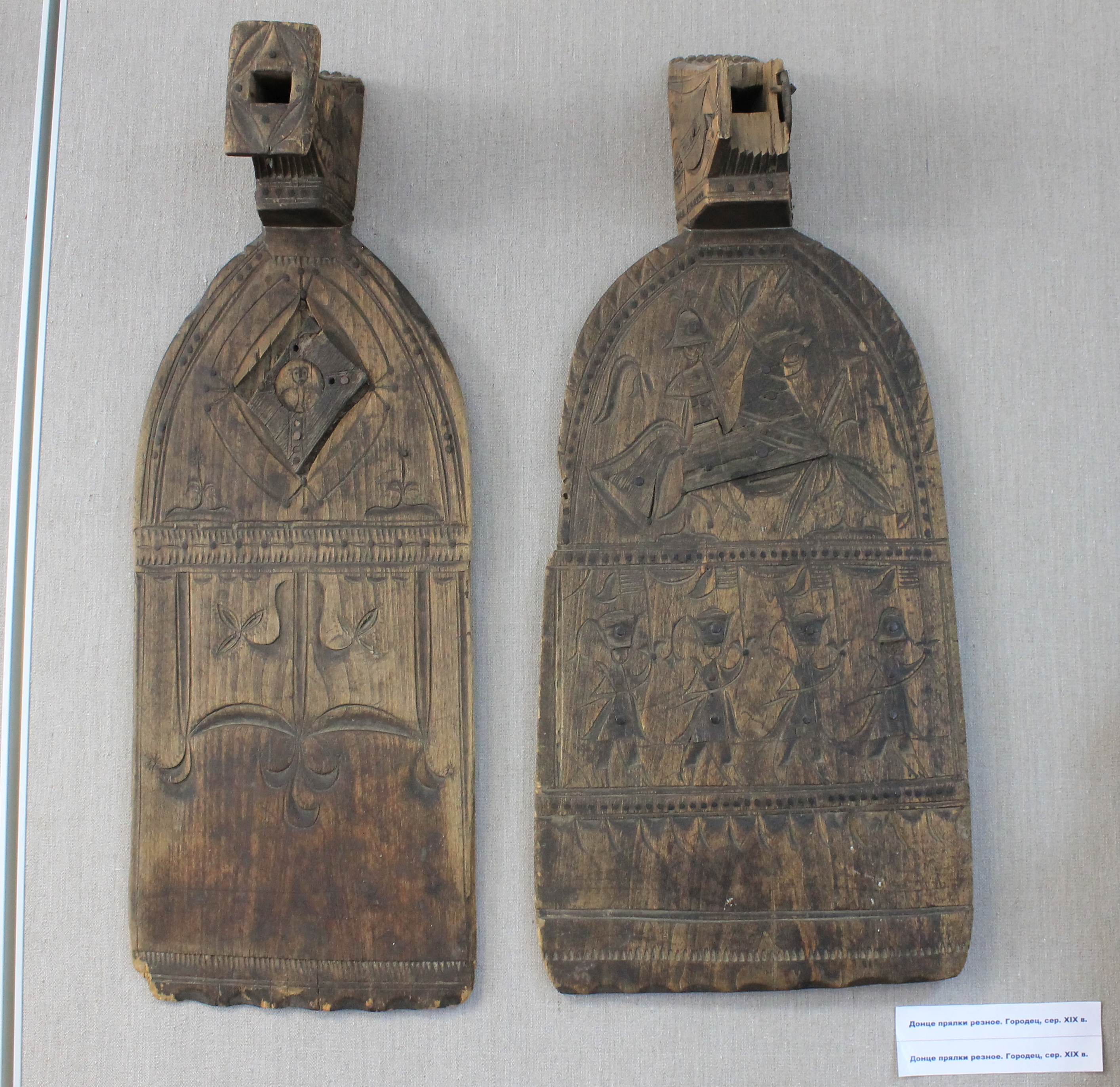 Донце-прялки, Городец, Нижегородская губерния, середина XIX века (Краеведческий музей Пучежского муниципального района)